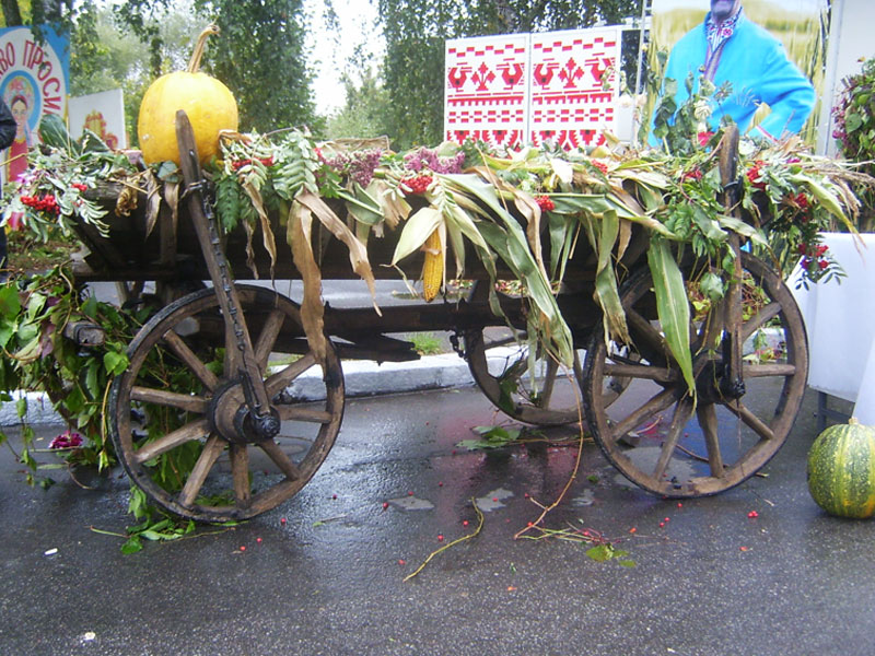 Ярмарок сільського господарства у Хмельницькому на День міста